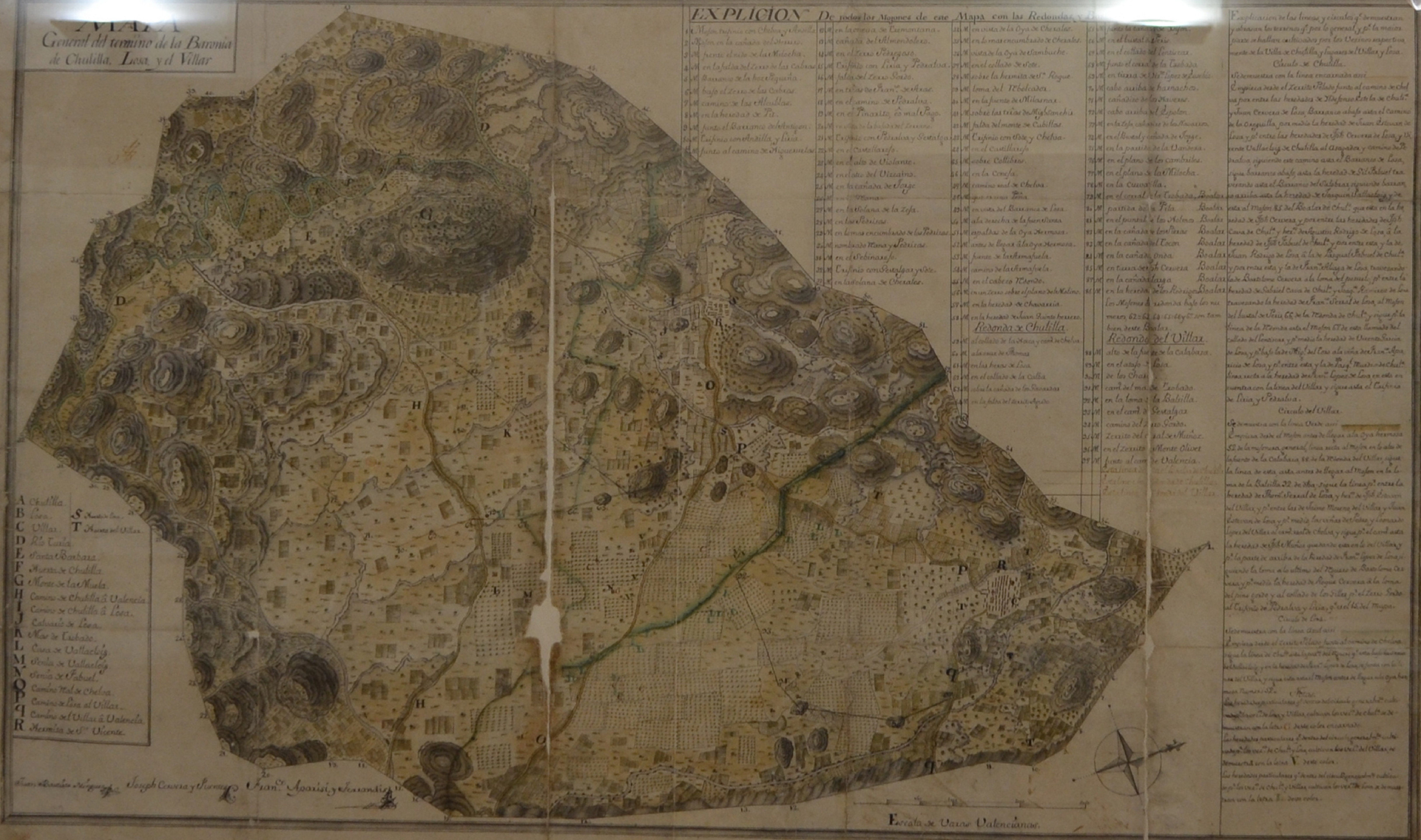 Mapa per a la partició del terme general de la baronia de Xulilla, el cual inclous les poblacions de El Villar i La Llosa del Bisbe, dibuixat per Joan Batista Minguez, arquitecte, i Josep Cervera Fuentes i Francesc Aparisi Ferrandiz, agrimensors (1770). ARV: Mapes i plànols, n-um. 224. Arxiu del Regne de València.